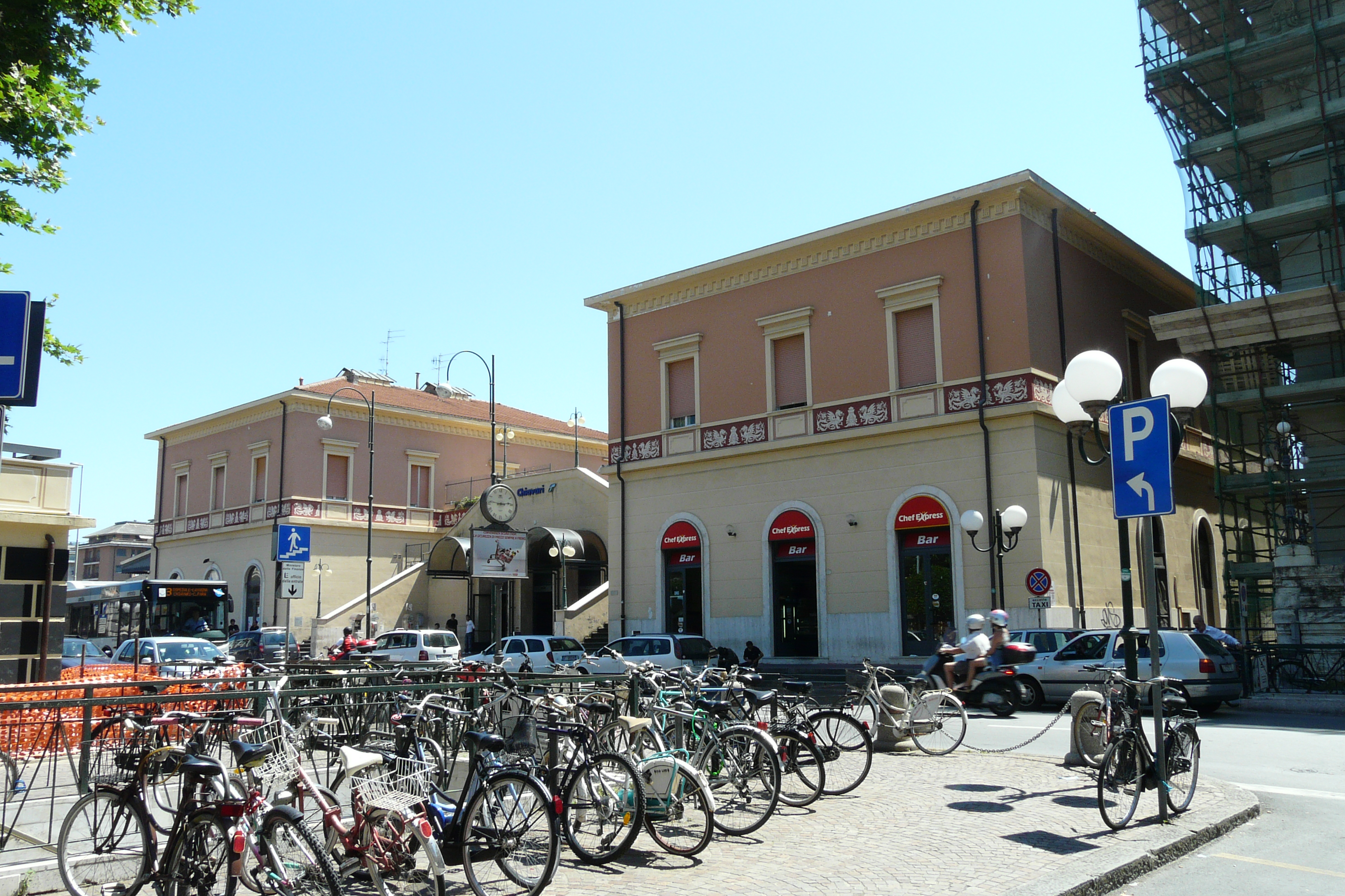 Stazione ferroviaria, Chiavari, Liguria, Italia